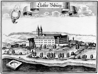 Kupferstich von Michael Wening: Kloster Biburg, Landkreis Kelheim. Niederbayern